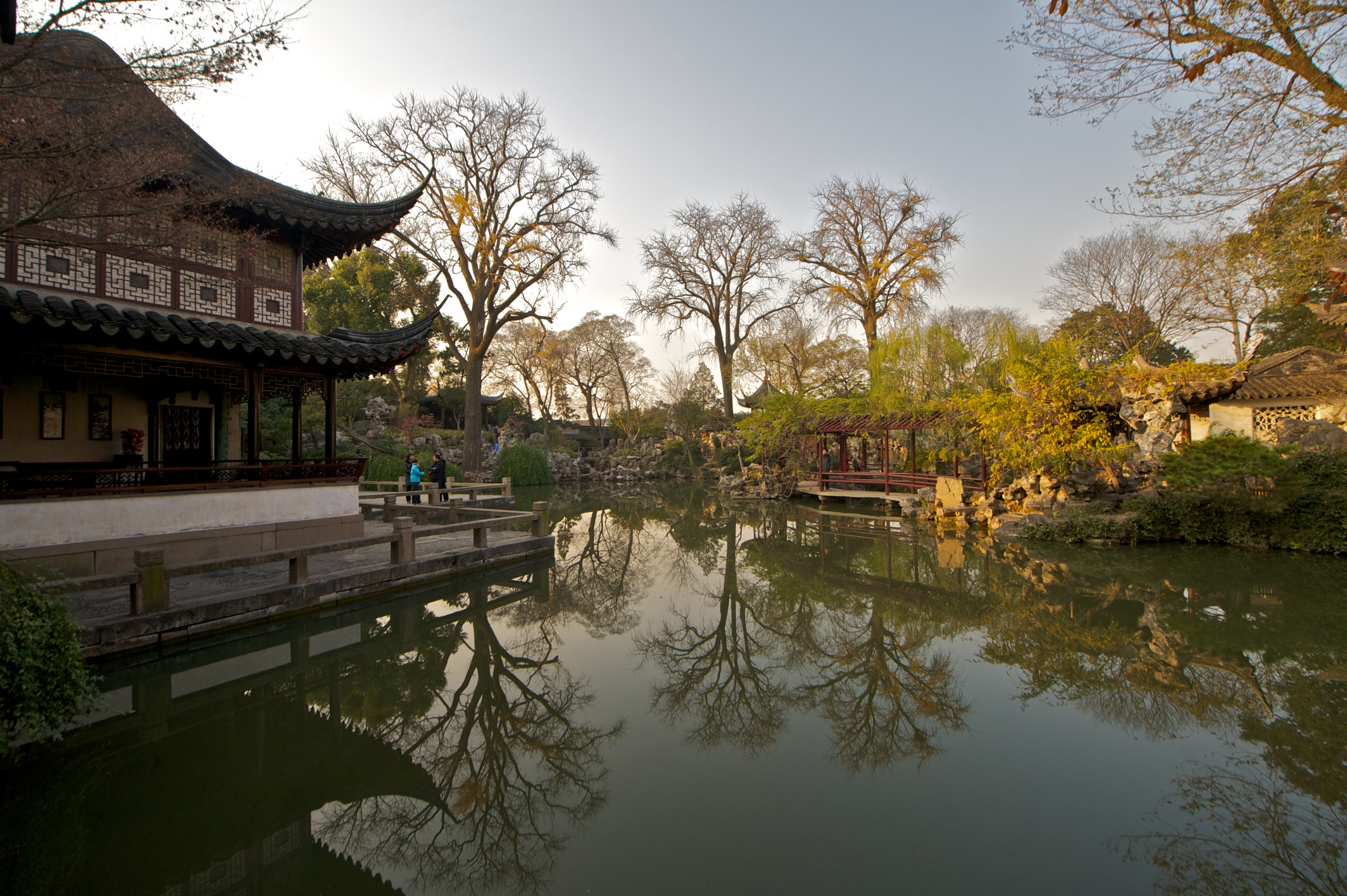 Lingering Garden, Suzhou. 留园。